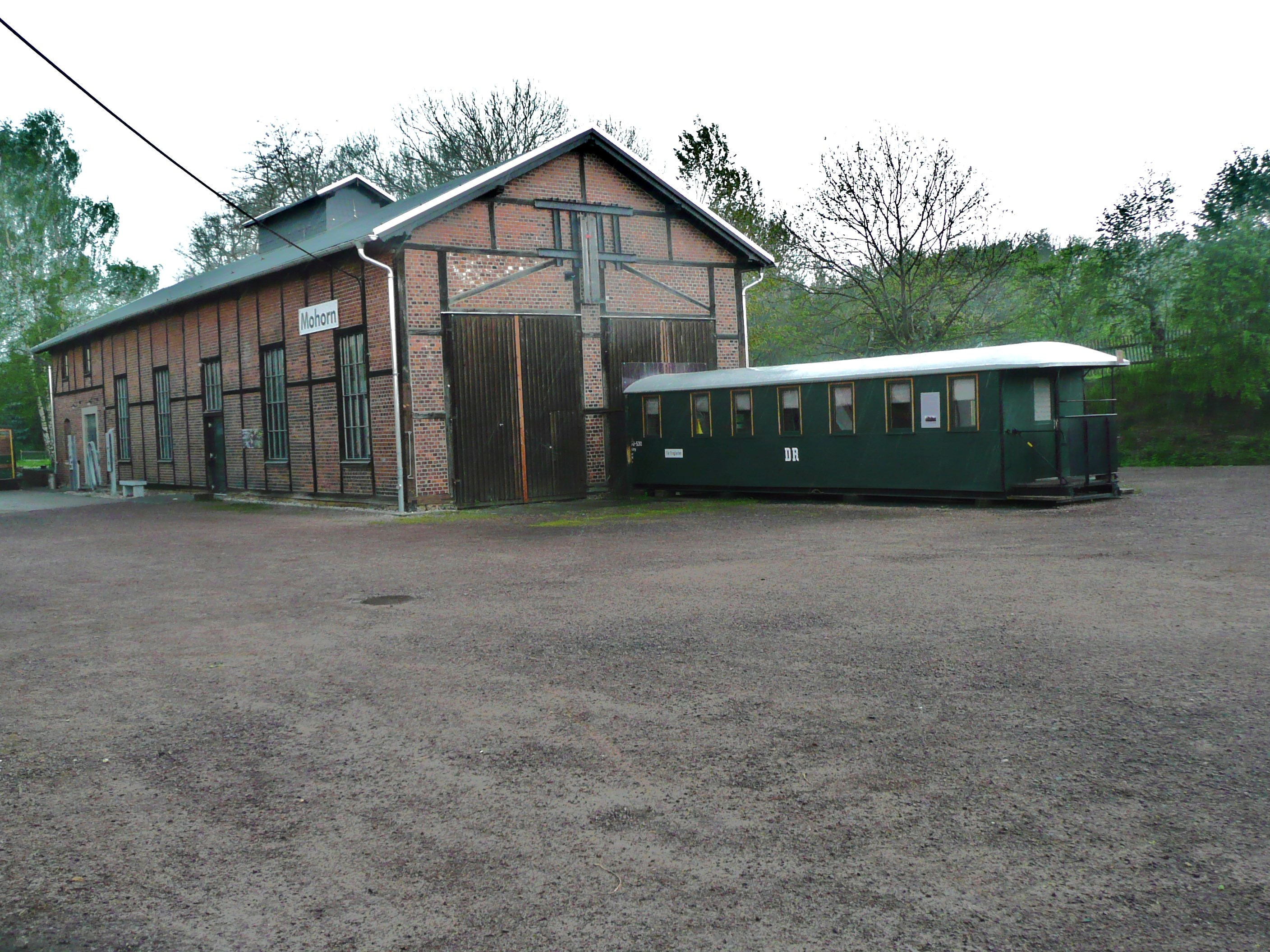 Lokschuppen Mohorn mit Wagen 970 530